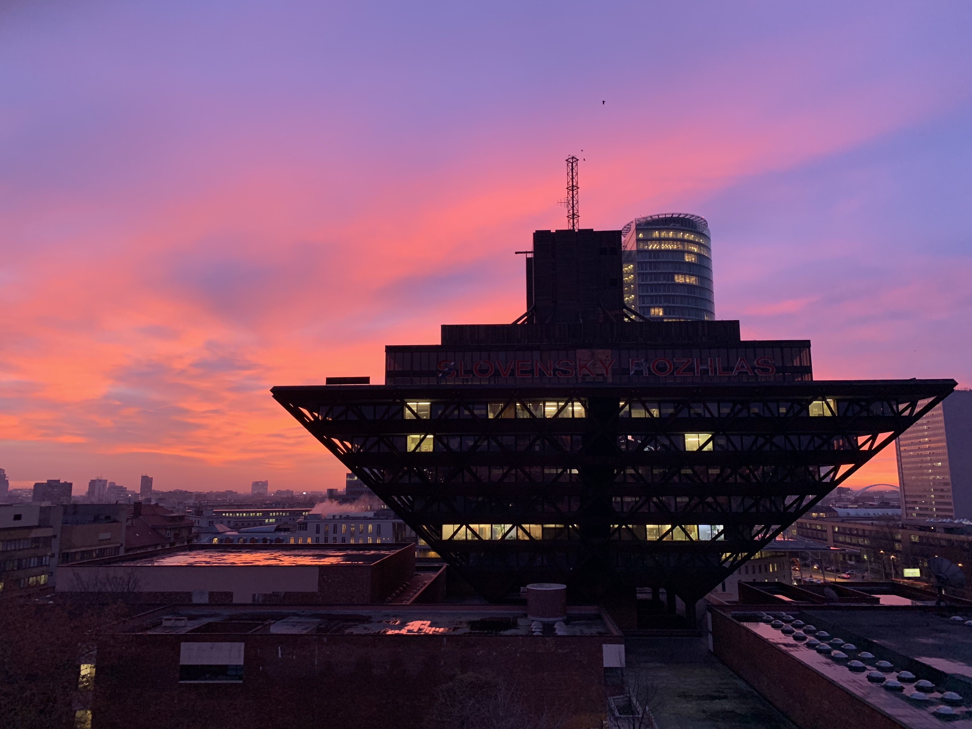 Budova Slovenského rozhlasu za svitania